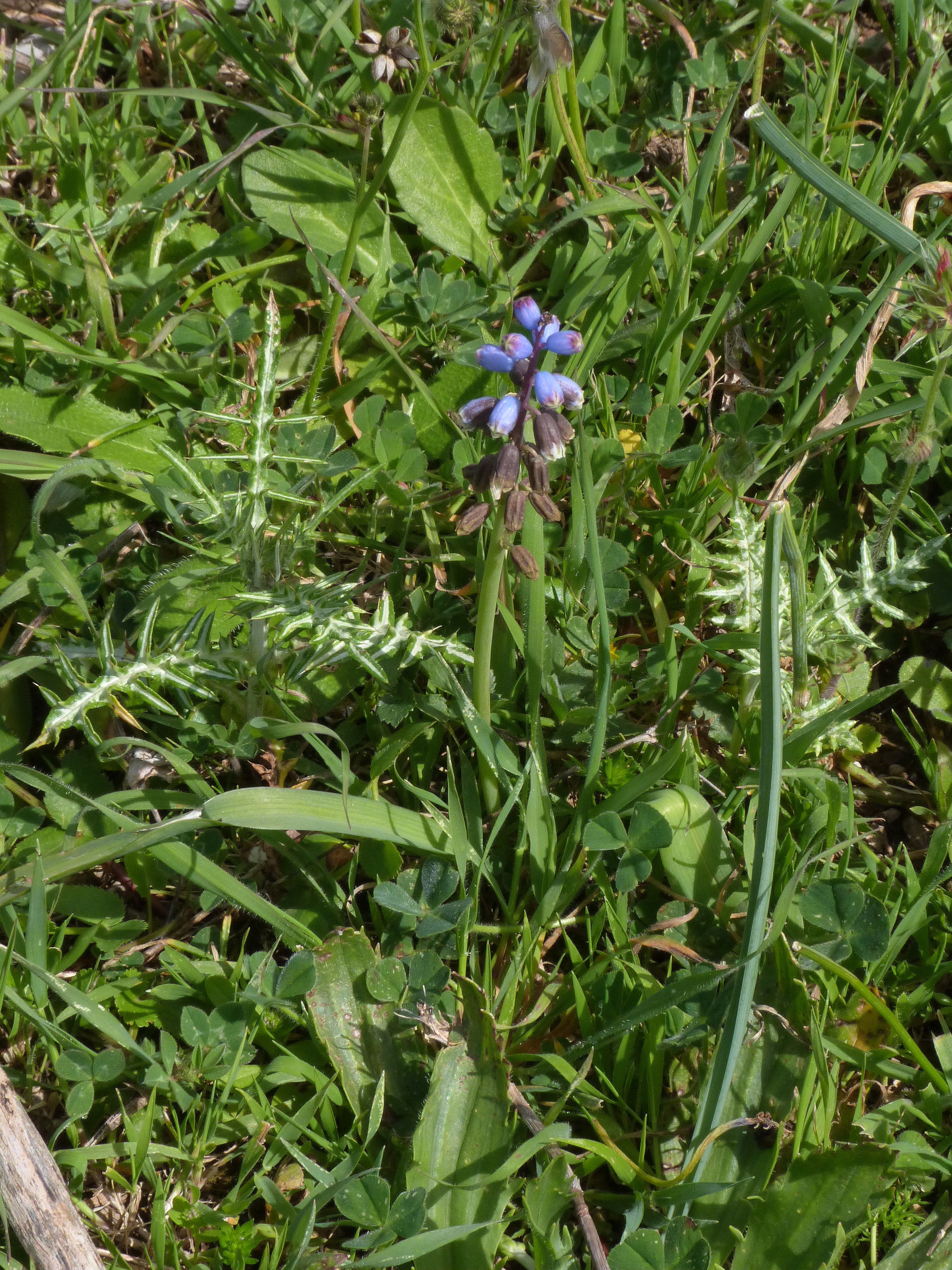 welche Traubenhyazinthe?